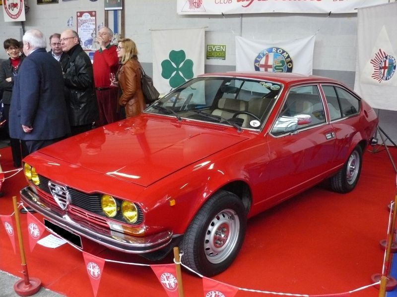 Reims 2012